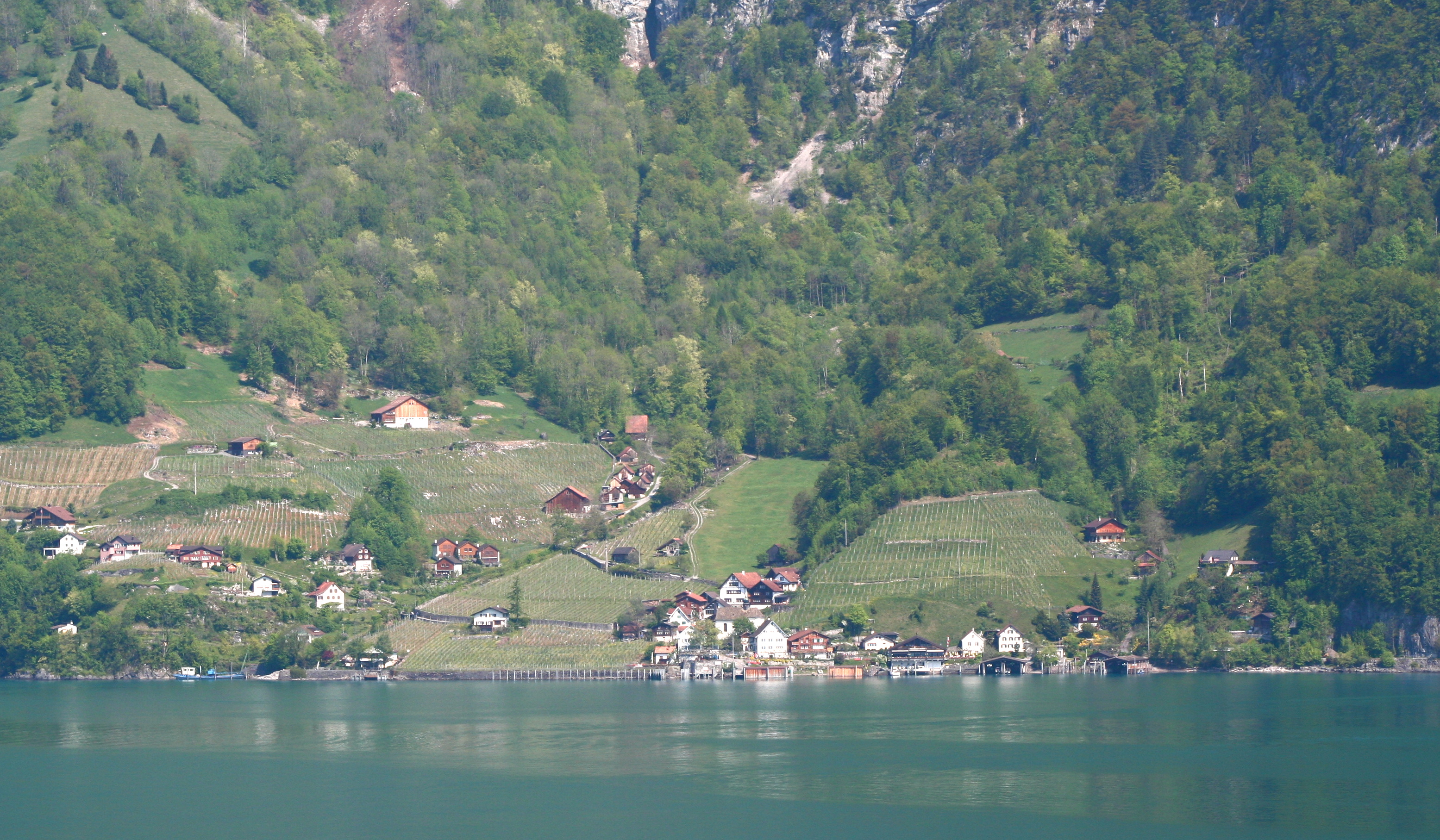 Quinten am Walensee